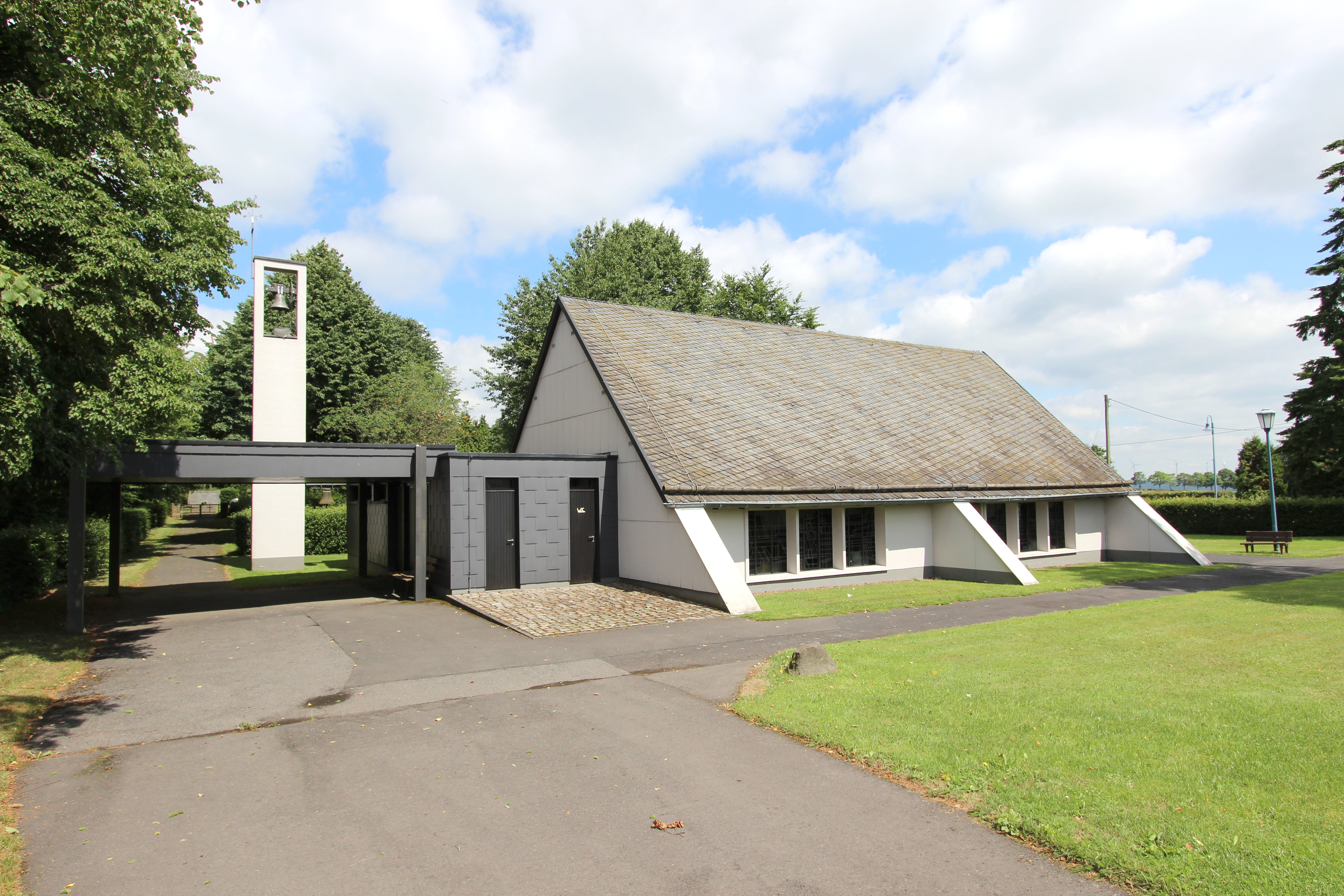 54611 Scheid, Frauenkroner Straße 1. Die Kapelle liegt im Oberdorf, Richtung Losheim, an der Gabelung nach Frauenkron. Die alte Kapelle stand im Unterdorf und wurde zwecks Verbreiterung der Straße im Zuge der Flurbereinigung im Jahre 1966 abgerissen. Aufnahme von 2017.